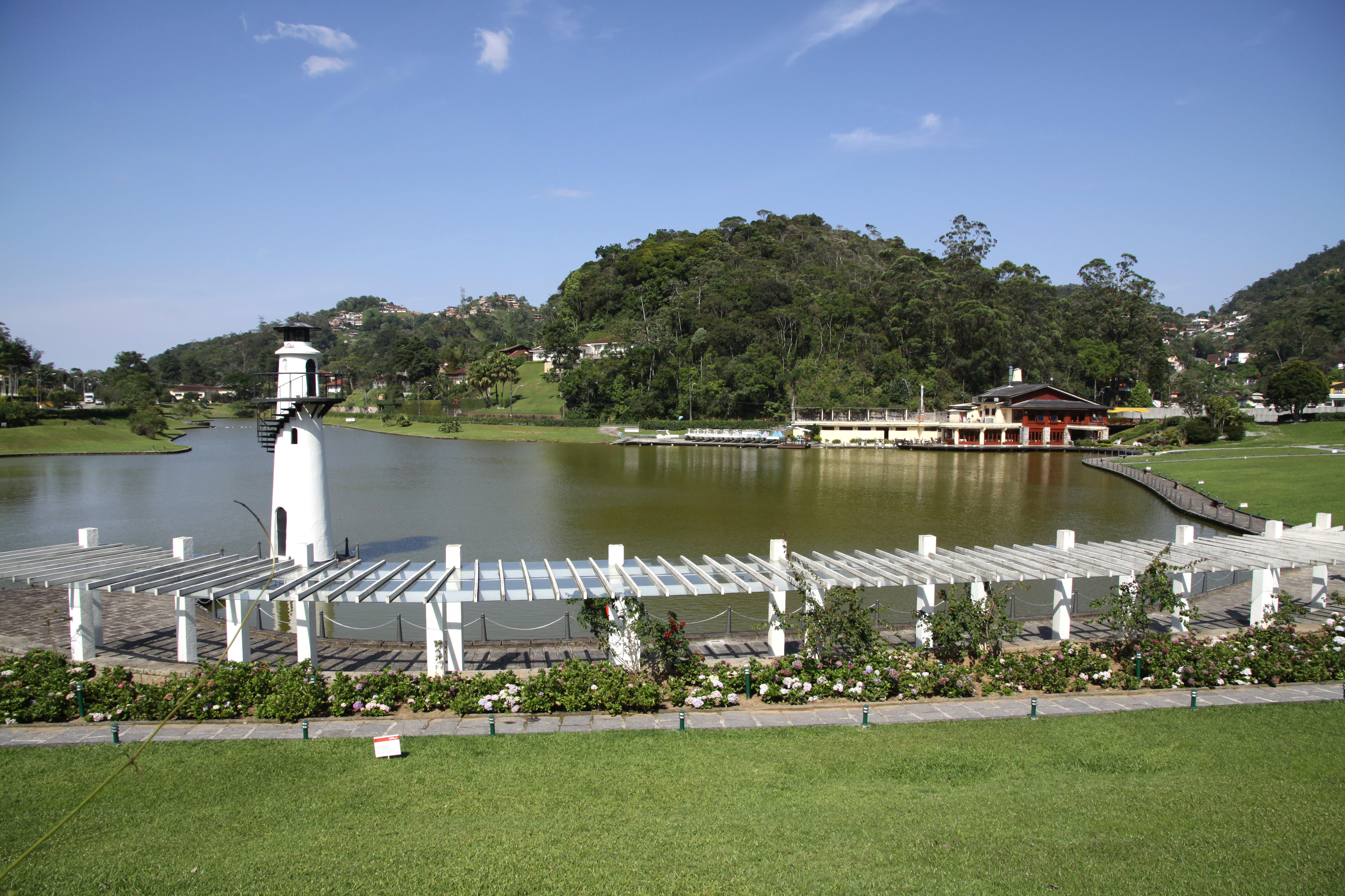 O tombamento do Hotel Quitandinha compreende todo o complexo do antigo hotel, seus interiores, mobiliário e a paisagem que o envolve, na qual se destacam o lago e os jardins.